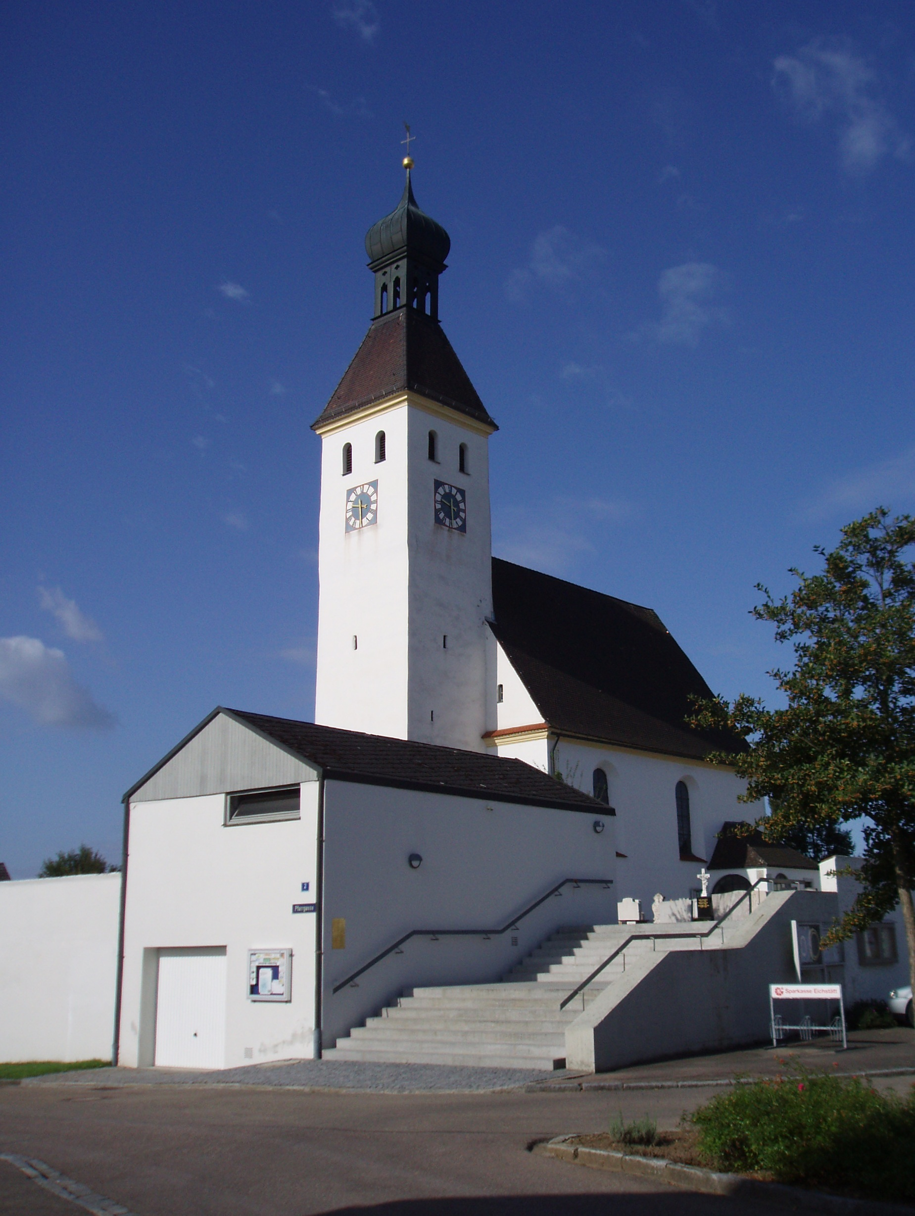 Katholische Pfarrkirche Mariä Himmelfahrt in Möckenlohe. Ansicht von NO.